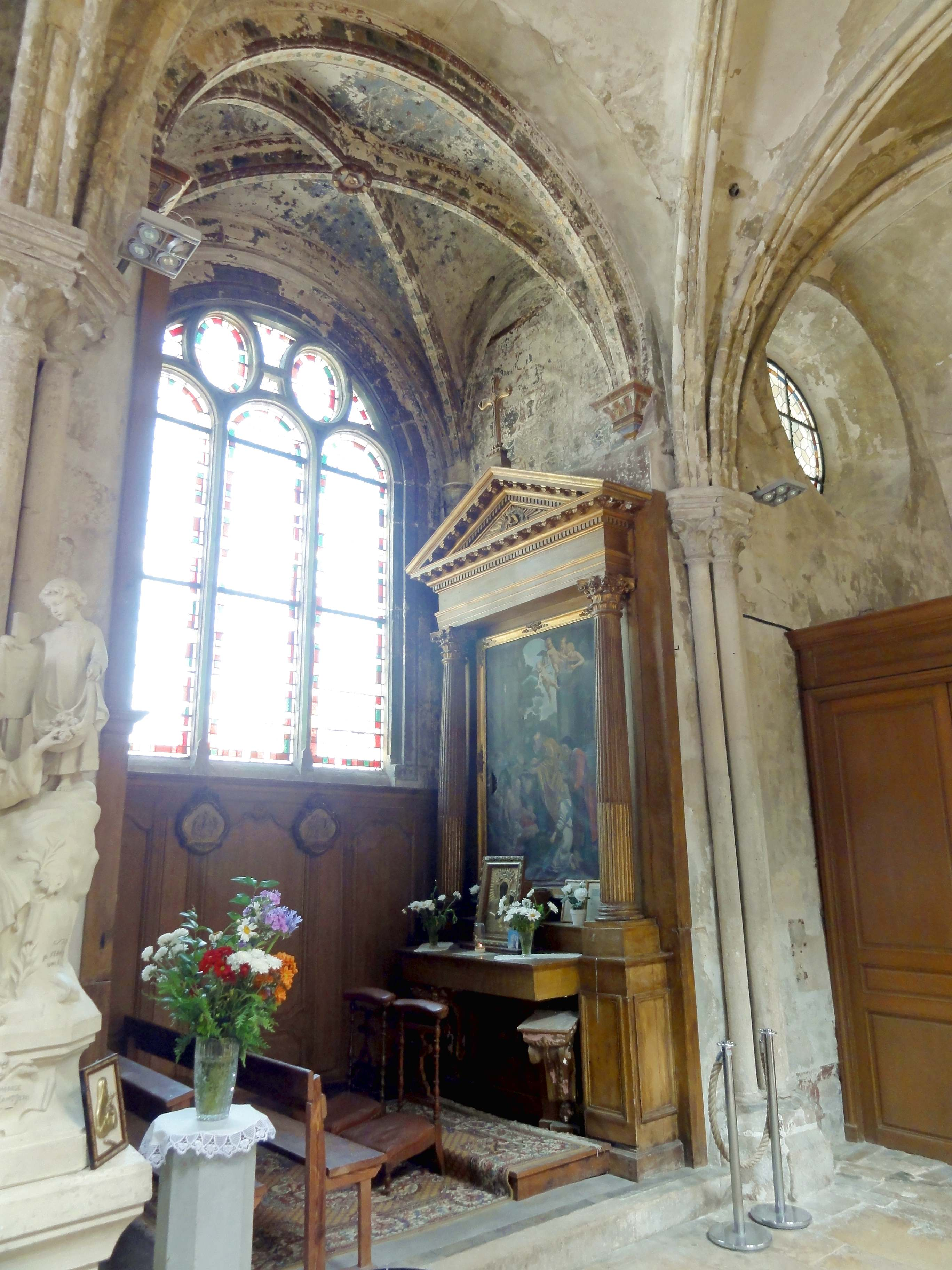 Voir titre.